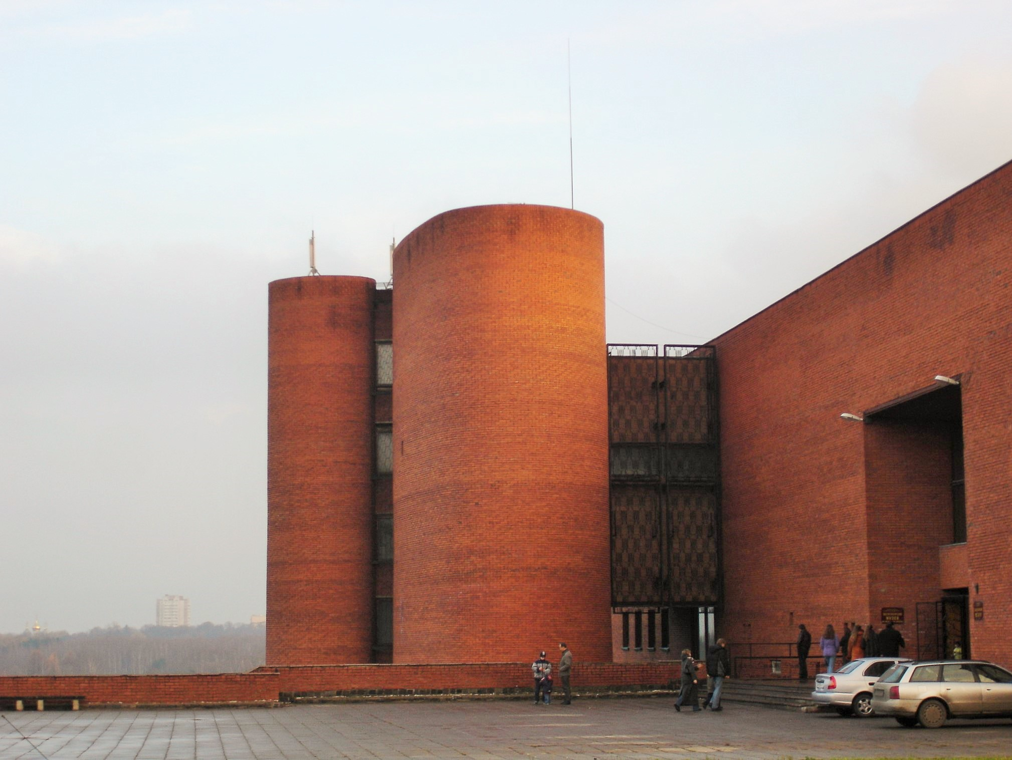 Фото музея Палеонтологии